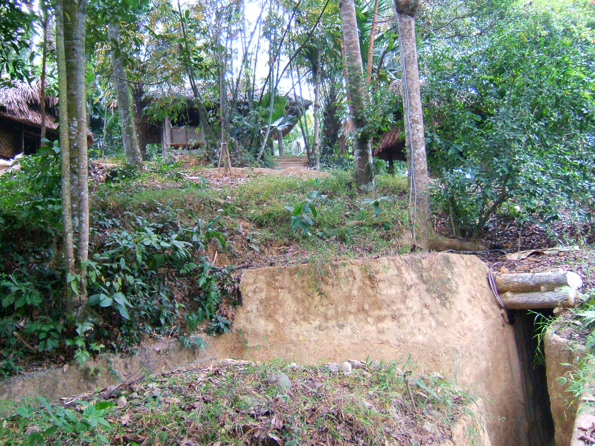 Di tích lịch sử cách mạng An toàn khu Định Hóa, Thái Nguyên Di tích lịch sử cách mạng An toàn khu Định Hóa, Thái Nguyên